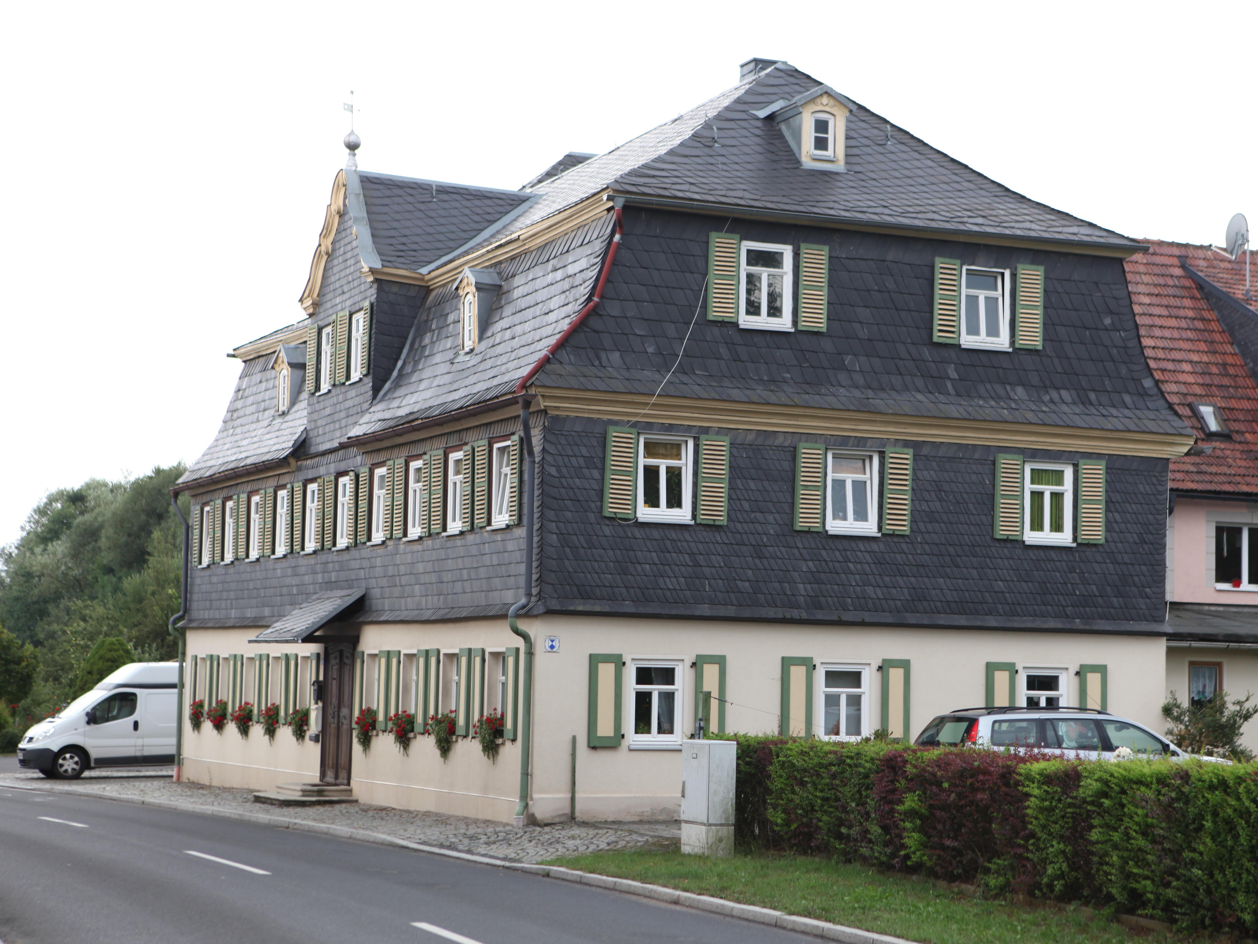 Hauptgebäude der ehem. unteren Mühle in Heubisch, Ot Föritz